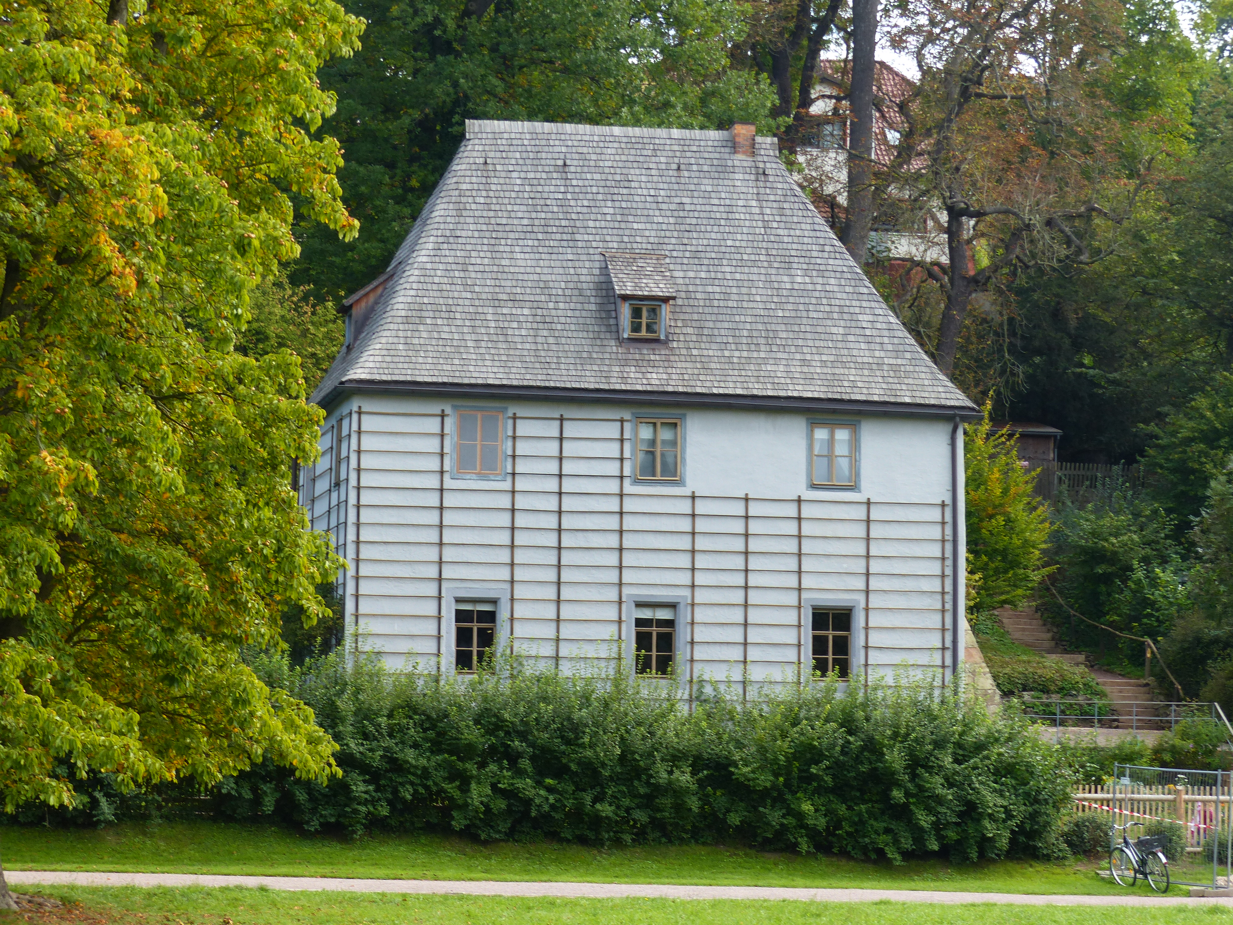 Goethes Gartenhaus in Weimar